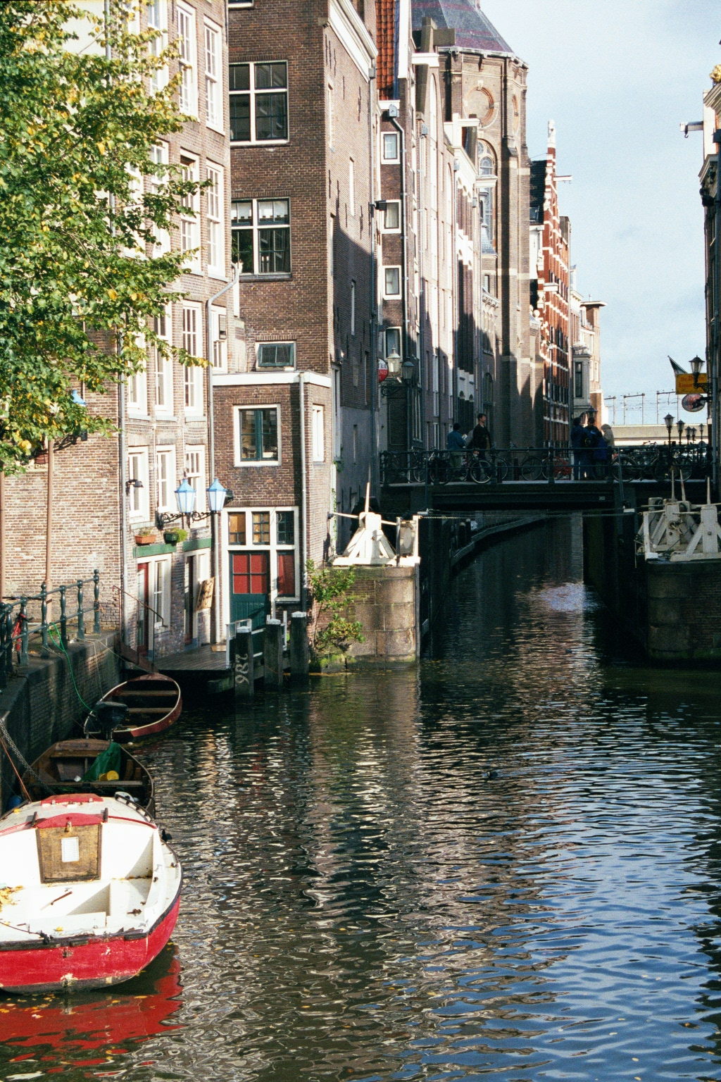 amsterdam canal